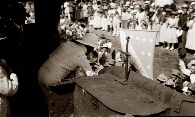 פתיחת קו הרכבת יפו-ירושלים לאחר הרחבתו, 1920 - ייתכן שהג'נטלמן בתמונה הוא הנציב הבריטי הרברט סמואל